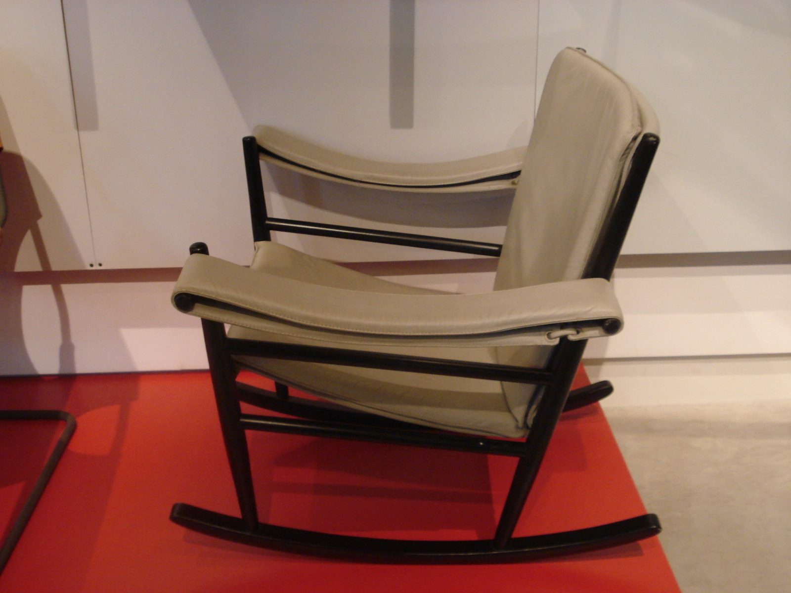 Poltrona de embalo, projetada por Joaquim Tenreiro (1902-1992) em 1947. Tem estrutura em pau-marfim maciço, natural ou ebanizado, estofamento em espuma ou poliuretano e revestimento em couro natural. Este modelo foi reeditado pela Projeto em 1992 e é a única peça de Tenreiro disponível para compra. O exemplar exibido na fotografia data do fim da década de 1940 e pertence à coleção do Museu da Casa Brasileira.